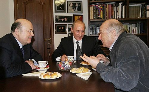 ТЕАТР «ЭТ СЕТЕРА». Перед просмотром театральной постановки «Концерт для друзей». Слева от Президента – руководитель театра Александр Калягин, справа – писатель-сатирик Михаил Жванецкий